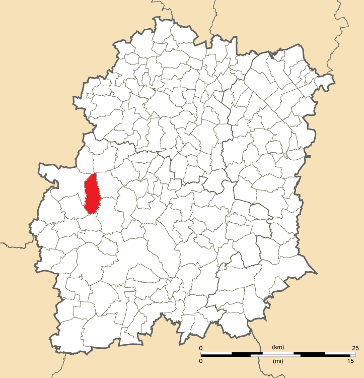 Carte de position de Roinville en Essonne (91)